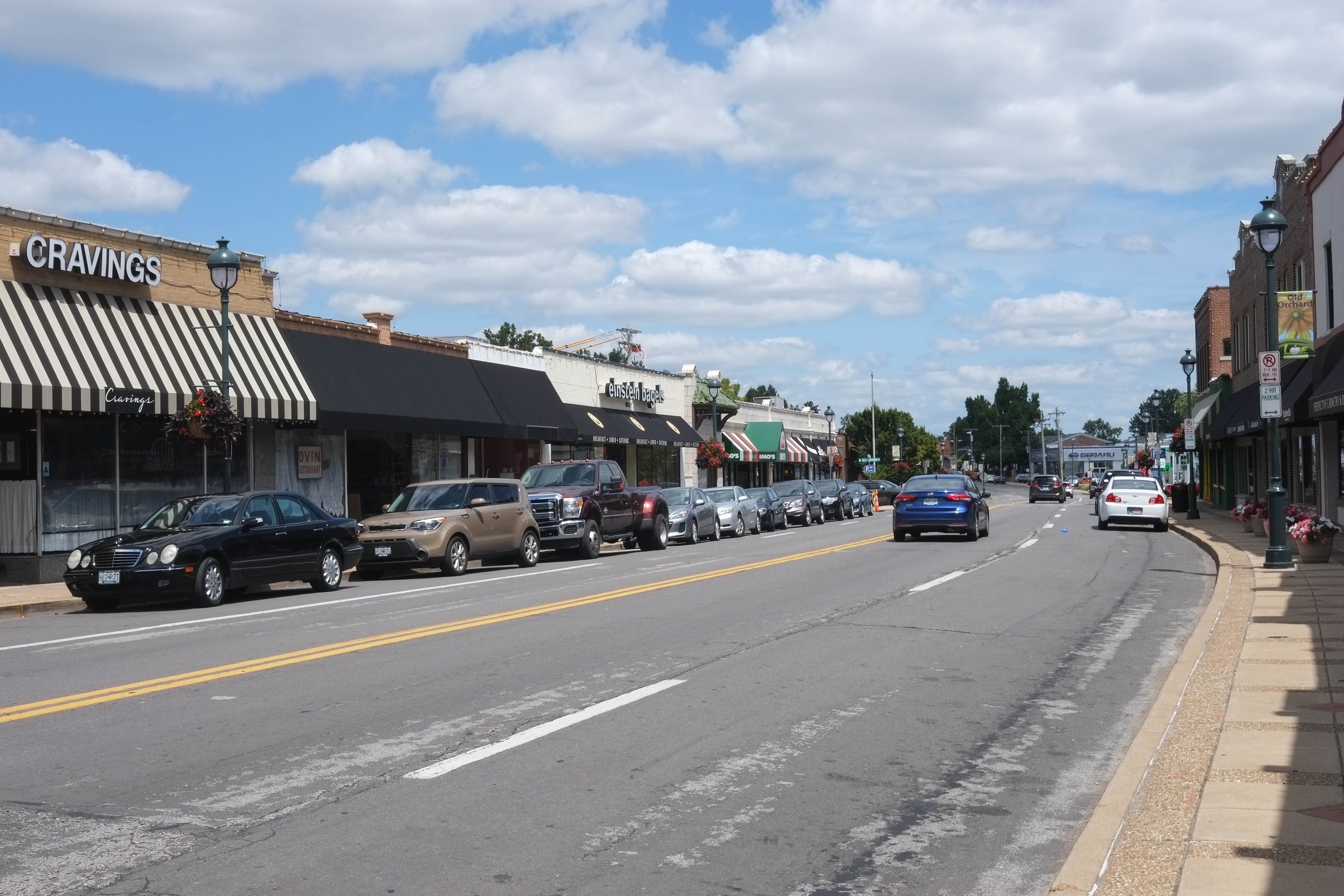 Big Bend in Webster Groves